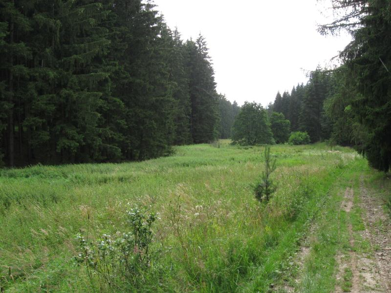 Údolí potoka Lopače